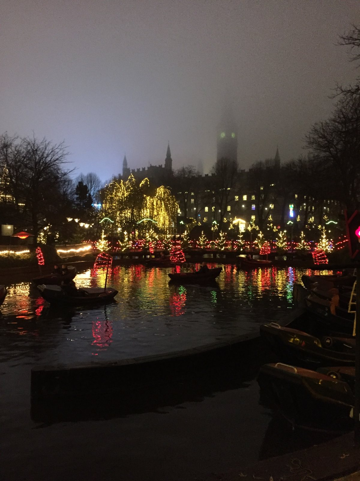 Тиволи ноћу